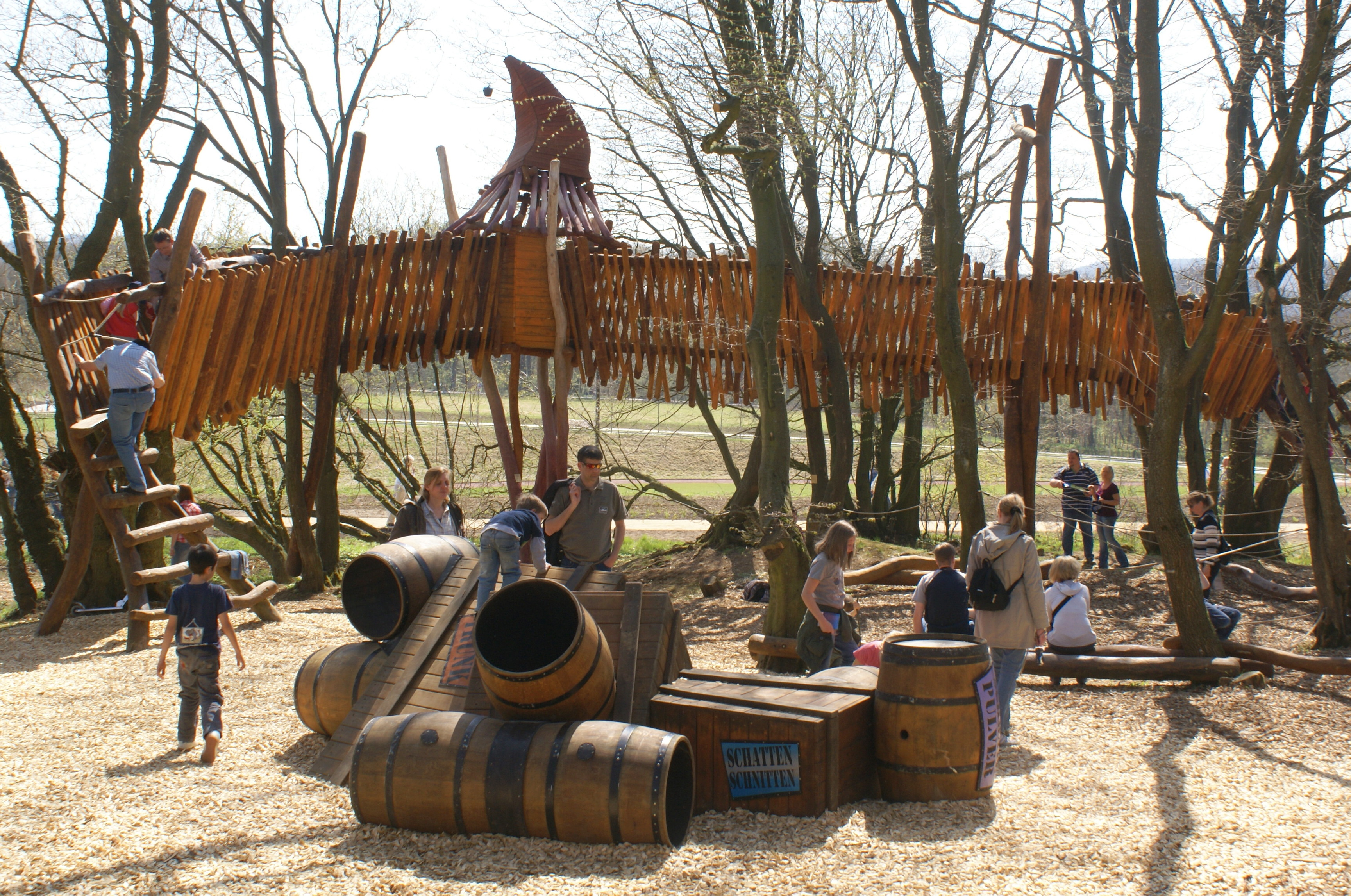 Waldspielplatz Zwergengold auf der Landesgartenschau Hemer